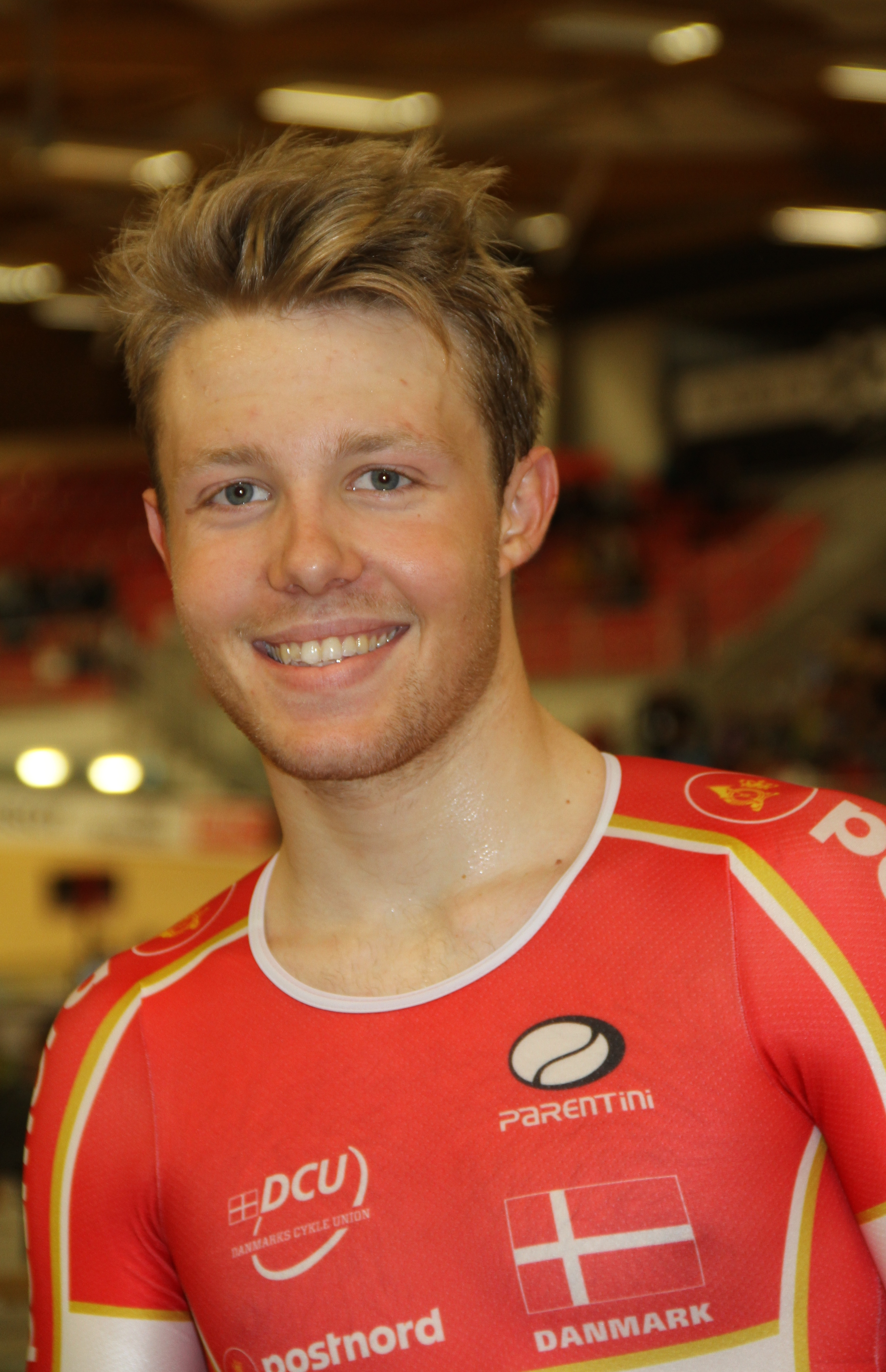 Casper Phillip Pedersen, dänischer Radsportler The making of this document was supported by the Community-Budget of Wikimedia Germany.